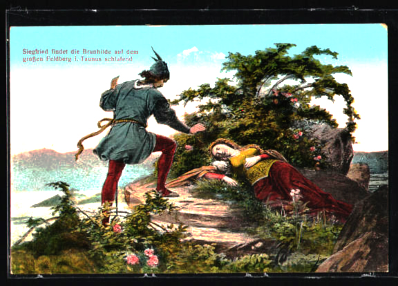 Nach der Orginalgrafik von "Christian Leopold Bode" (1831-1906) aus Offenbach: "Siegfried, Brunhild auf dem großen Feldberg im Taunus findend"